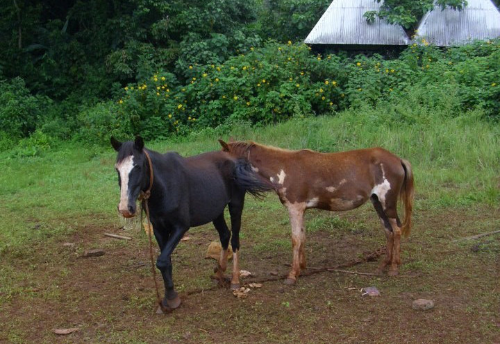 Batoufam, Cameroon